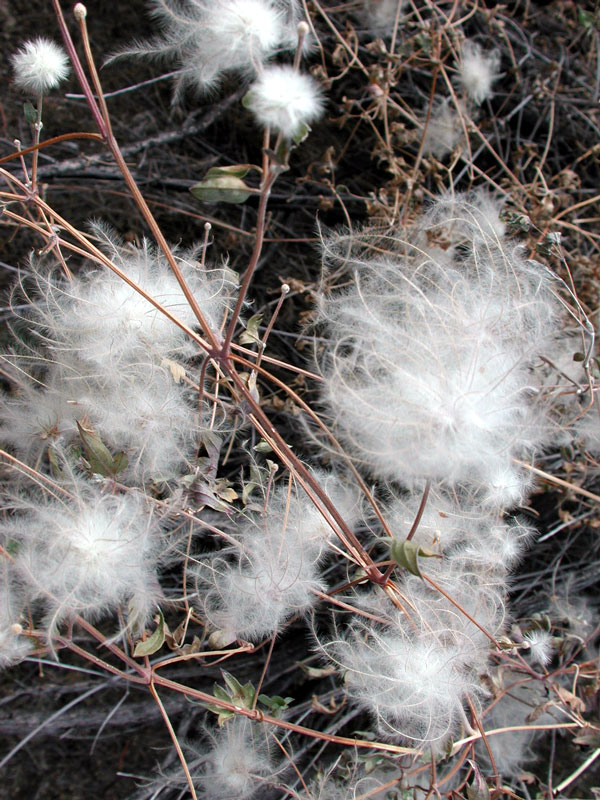 Clematis drummondii, Wickenburg Mountains, Yavapai Co., Arizona, USA.